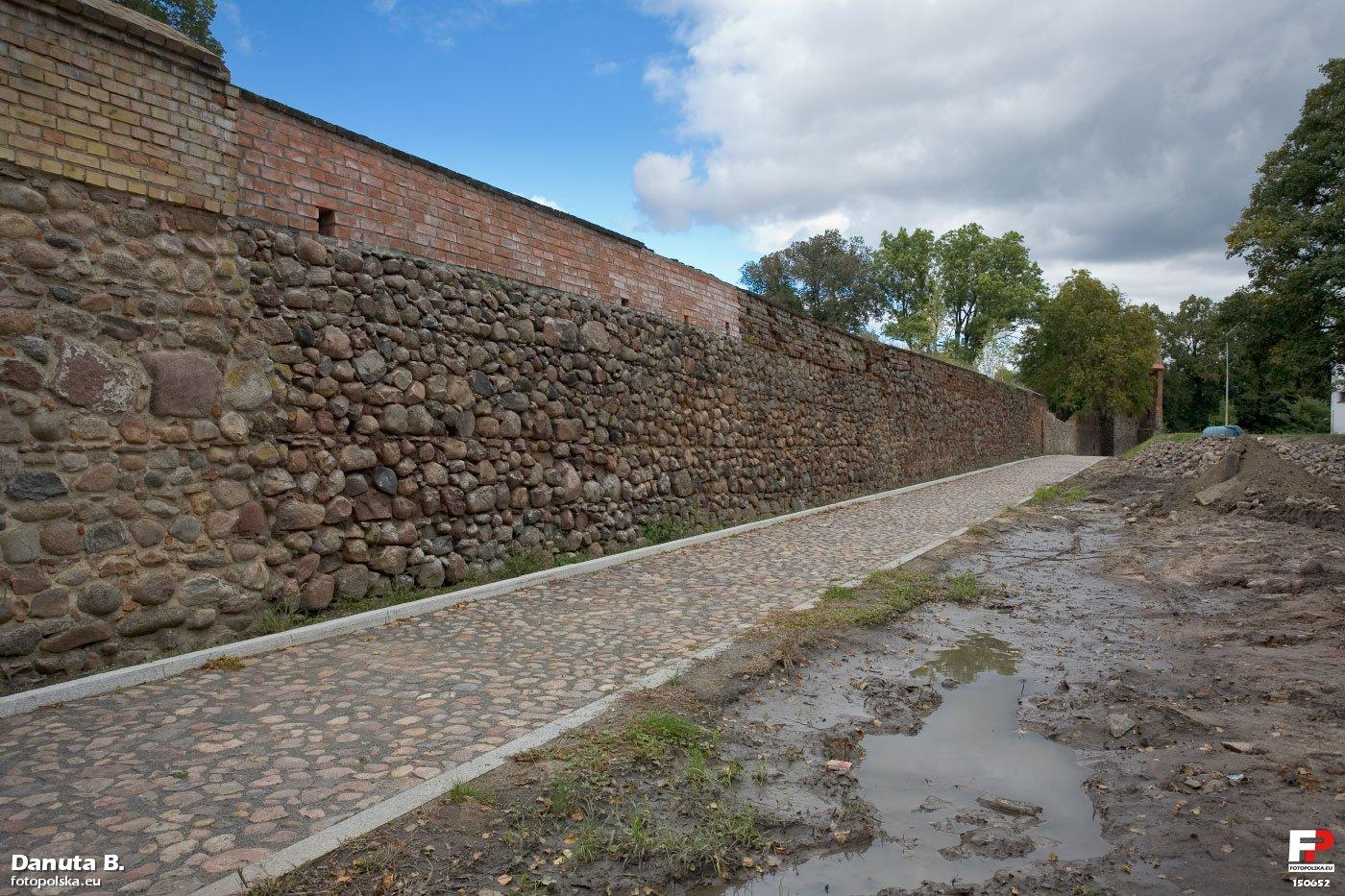 Mury miejskie wybudowano wokół Ośna w pierwszej połowie XIV wieku z kamienia polnego. Sięgały 6 metrów i były zakończone ceglanymi blankami. Dziś są znacznie niższe, ale zachowane na prawie całej długości, co czyni Ośno wyjątkowym miastem. W tym roku widać było końcówkę prac przy odtworzeniu ścieżki wzdłuż wewnętrznej strony murów. Istniała taka droga wcześniej, bowiem widziałam pocztówkę, na której nazywała się Sonnen Promenade.